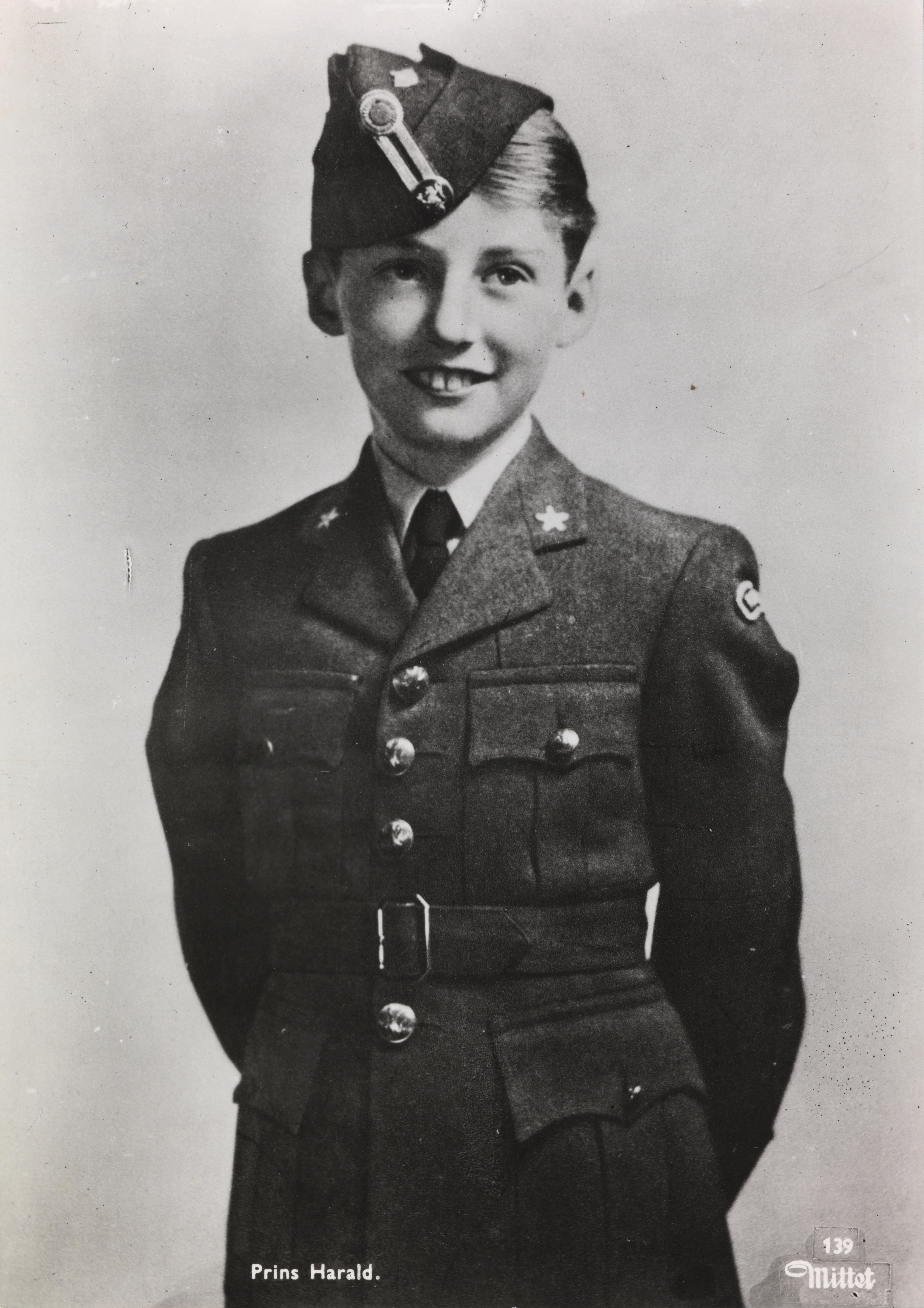 Bildet er hentet fra Nasjonalbibliotekets bildesamling. Anmerkninger til bildet var: Prins Harald stilte opp som maskot for det norske flyvåpenet i Canada under krigen. I følge Ivar Ulvestad: Norske postkort. Kulturhistorie og samleobjekter, 2005, s. 89 er bildet tatt i treningsleiren Little Norway i 1943 og sannsynligvis utgitt av Mittet til julen 1945. Depicted person: Harald V konge av Norge